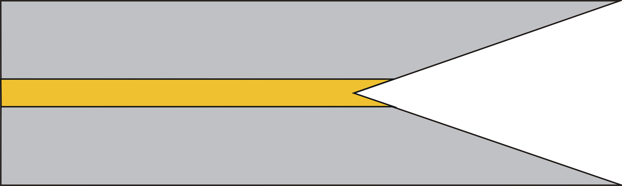 Barwy - proporczyk 3 Pułku Szwoleżerów Mazowieckich